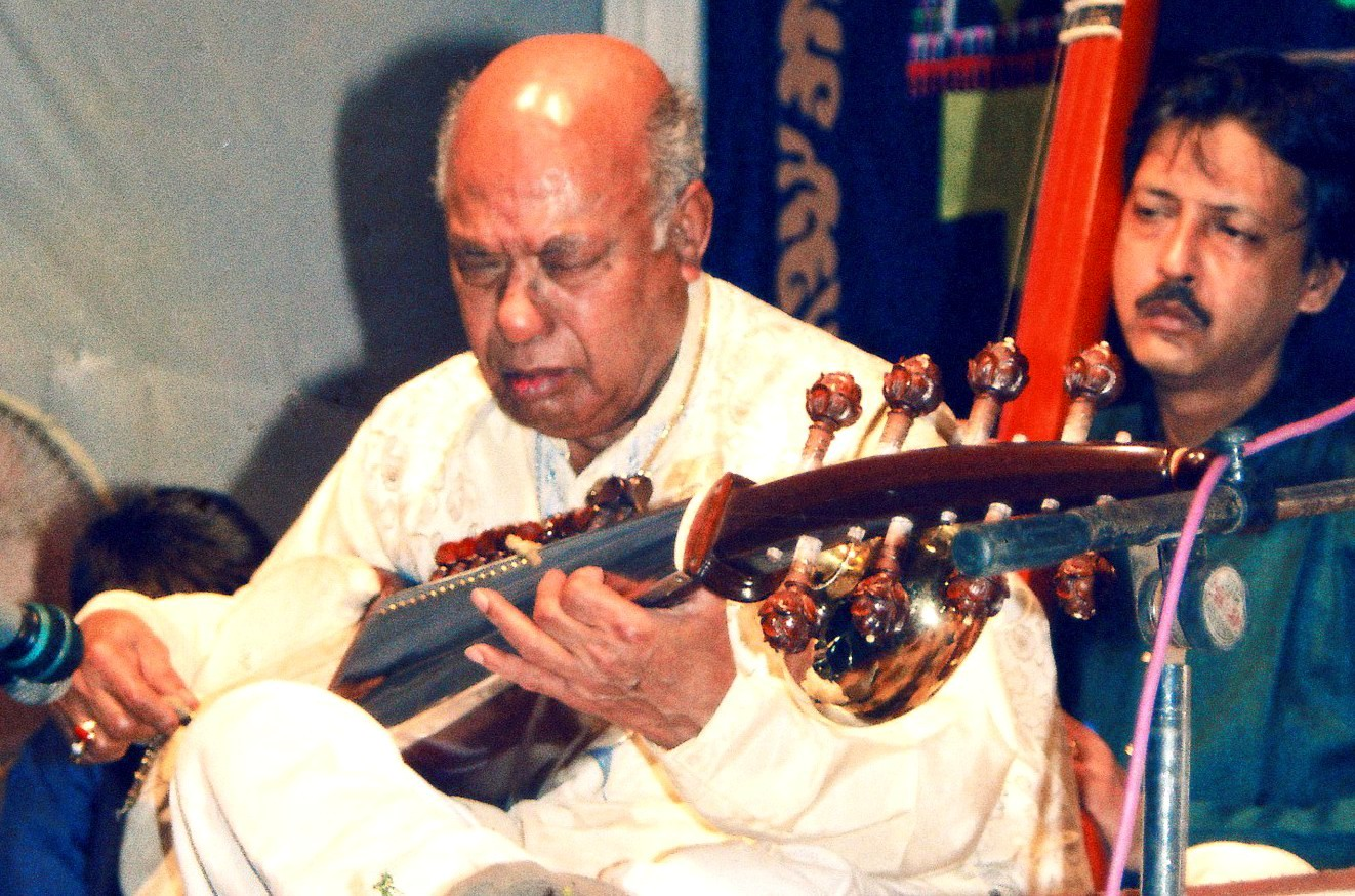 അലി അക്ബർഖാൻ